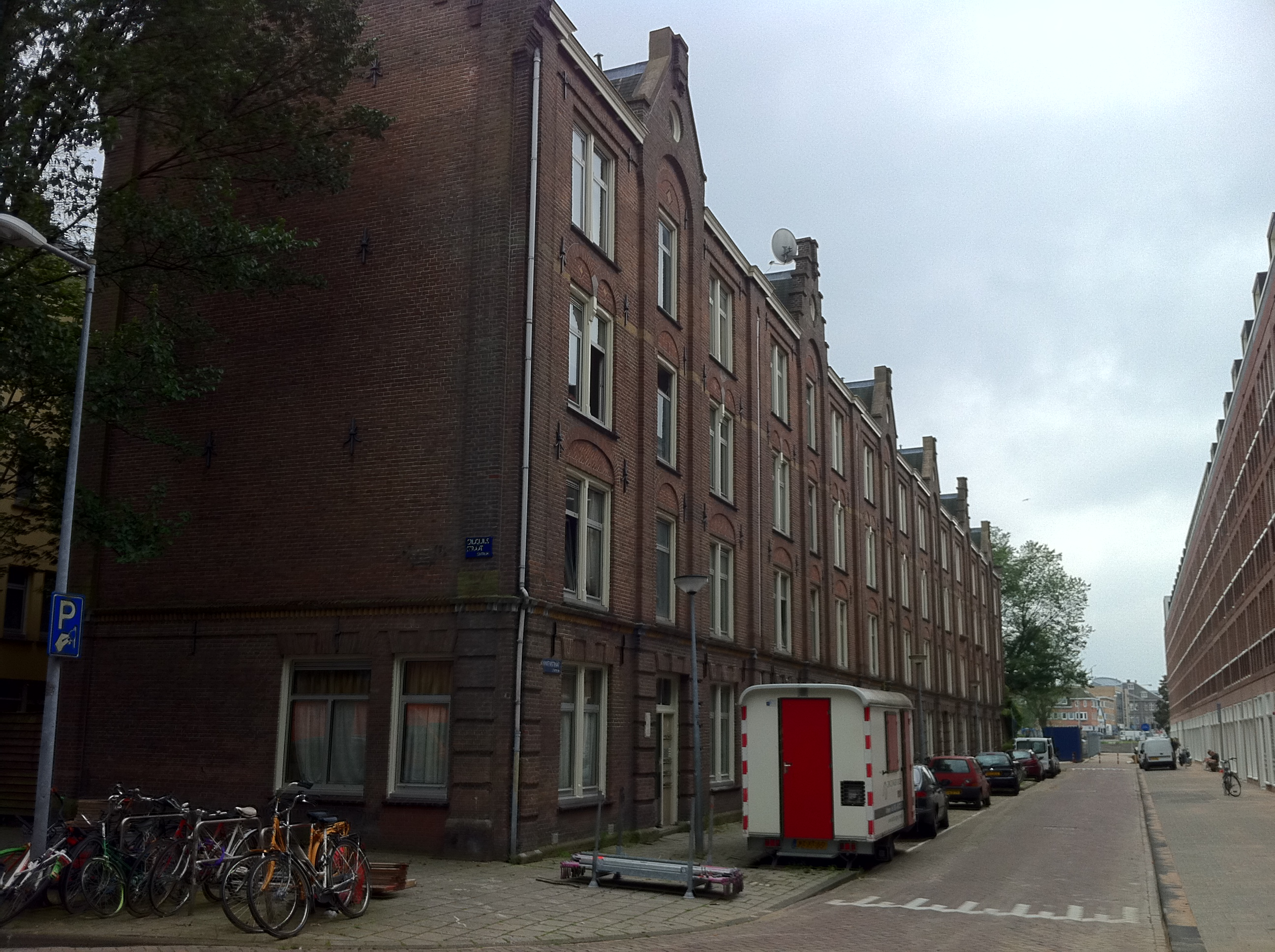 Czaar Peterbuurt Amsterdam, hoek Cruqiusstraat - Blankenstraat, , links woonblok gebouwd als Blankenstraat 2-12, 48 2-kamerwoningen gebouwd door deAmsterdamsche Vereeniging tot het bouwen van Arbeiderswoningen in 1878-1879, architect Bastiaan de Greef